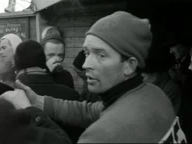 Klaas Lefferstra, Elfstedentocht 1954.